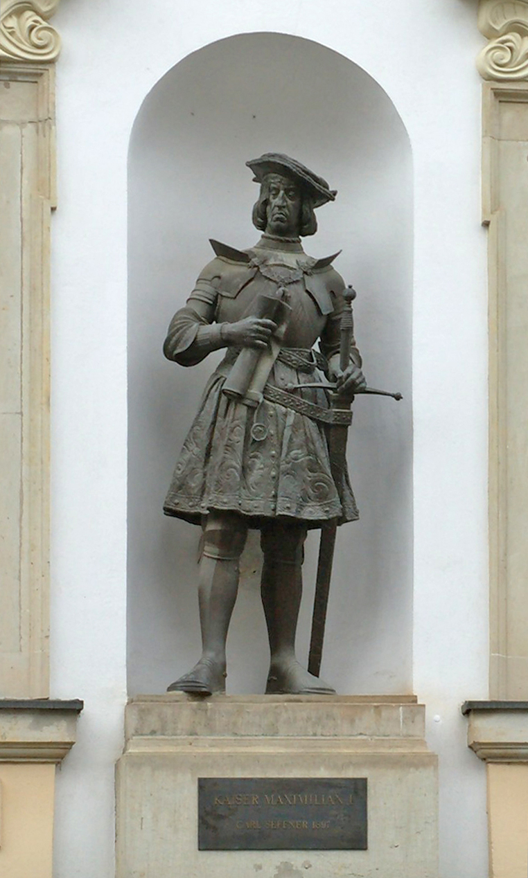 Bronzestatue Maximilian I., geschaffen 1897 von Carl Seffner, am Messehaus Städtisches Kaufhaus in Leipzig.